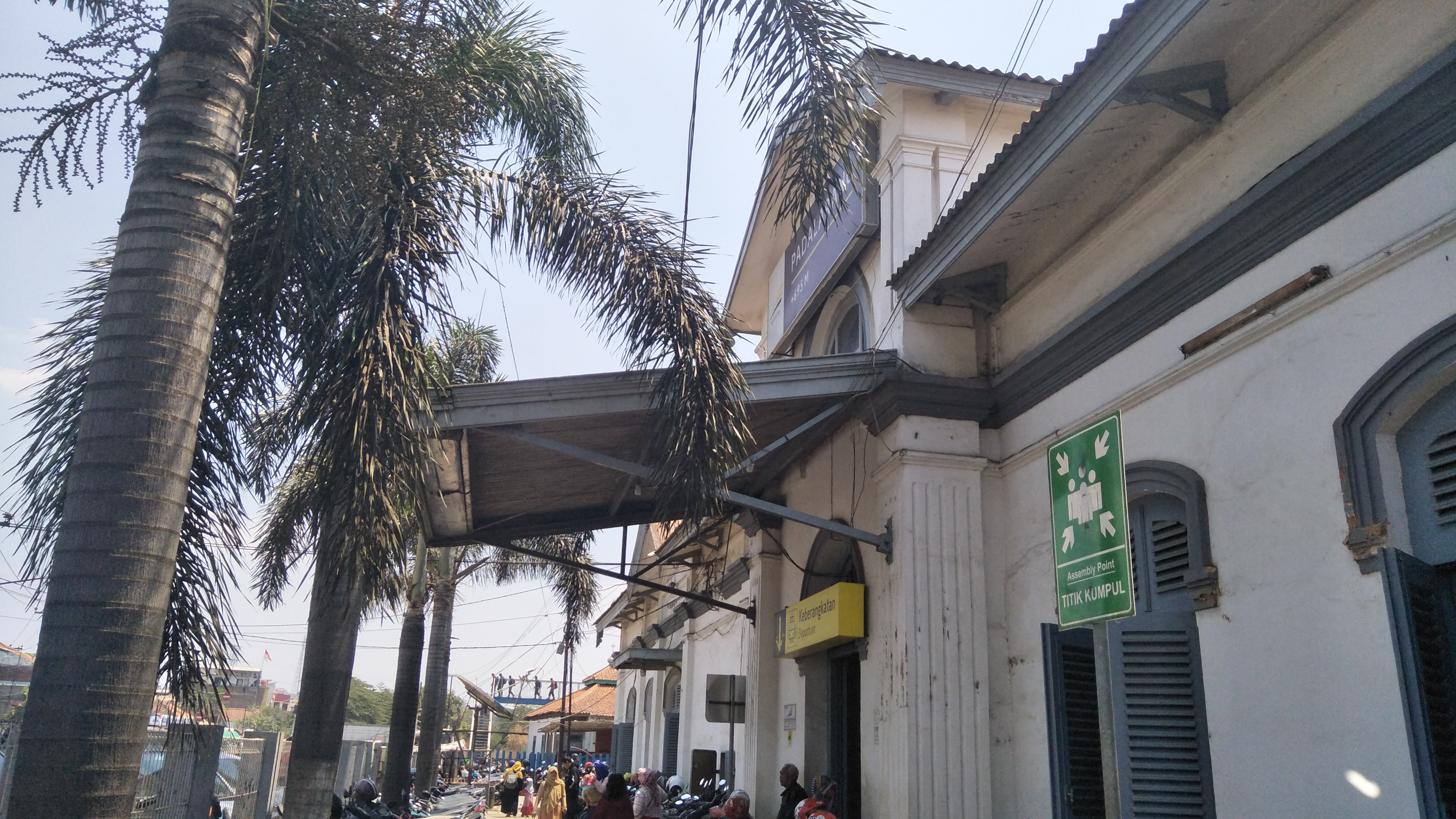 Stasiun Padalarang tampak depan